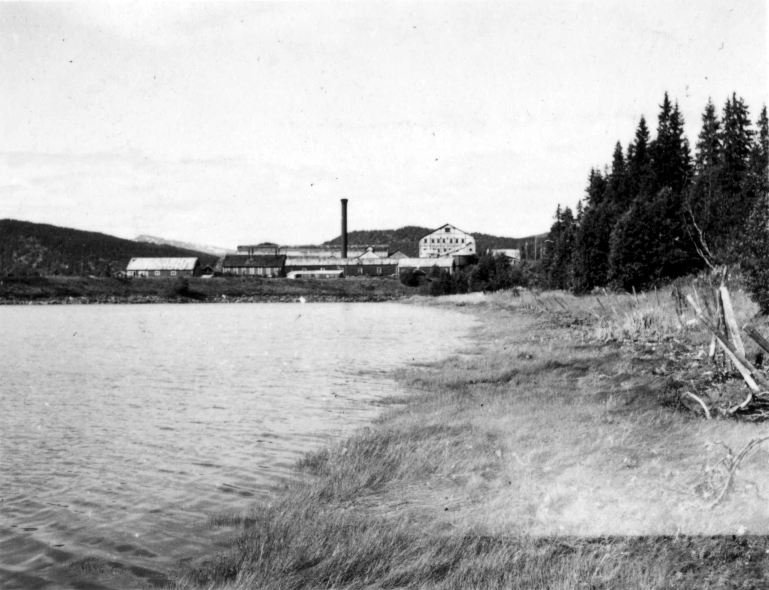 Fabrikken til Dunderland Iron Ore Company i Mo i Rana Tittel / Title: Dunderland Iron Ore Company Dato / Date: Ukjent/Unknown Fotograf / Photographer: Karl Marth Sted / Place: Mo i Rana, Nordland, Norge Eier / Owner Institution: Arkiv i Nordland Lenke / Link: Arkiv i Nordland Arkivreferanse /Archive reference: AIN.NA143.0146 Fra Dag Skogheims Privatarkiv